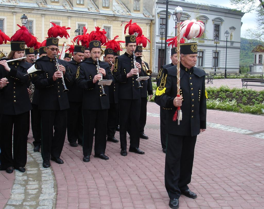 Sanocka kapela górnictwa naftowego. Die Sanoker Knappenkappelle.